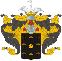 Герб рода Герб рода Бестужевых-Рюминых